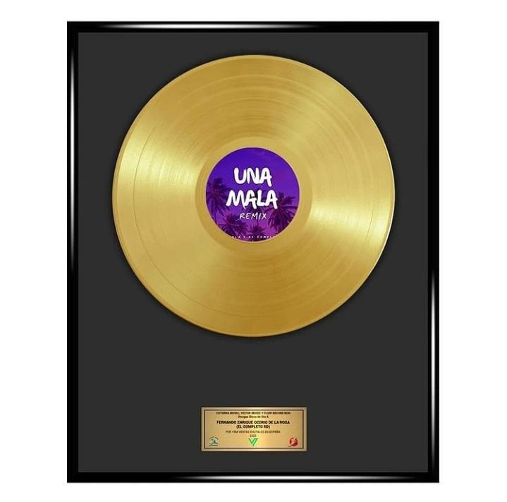 Imagen 125 años del CI